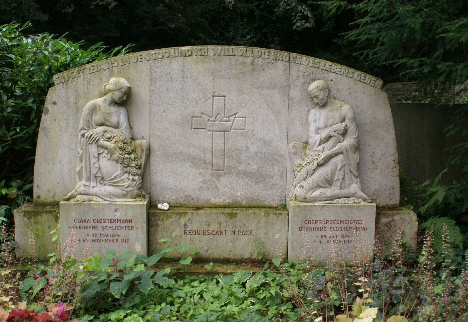 Ehrengrab des Oberbürgermeisters Bernhard Clostermann und seiner Frau auf dem Hauptfriedhof Koblenz